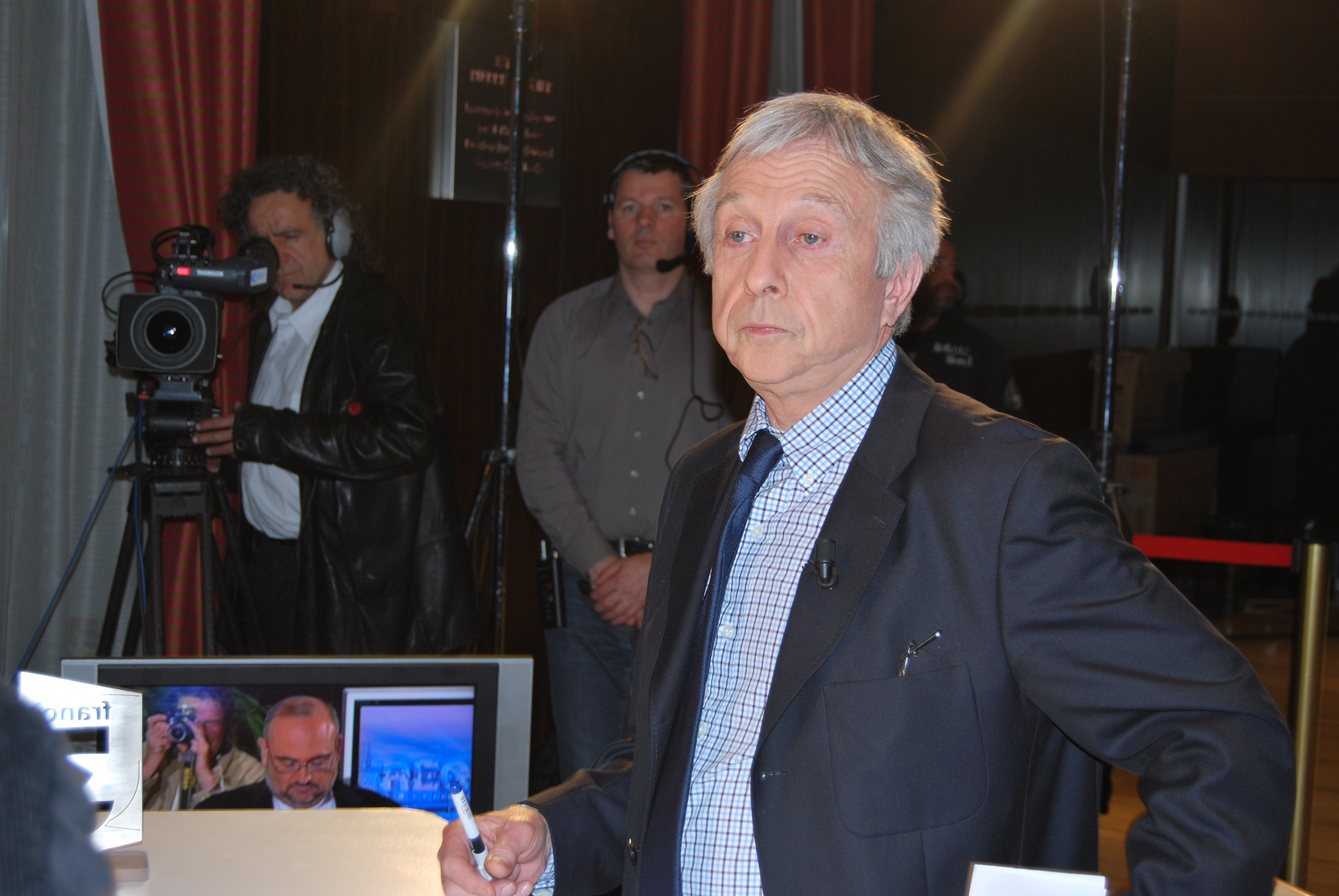 Elections Régionales Françaises de 2010, Préfecture de la Moselle le 21 Mars 2010. Emission en Direct de France 3 Lorraine de Jean-Christophe Dupuis-Rémond en direct sur Internet depuis la Préfecture de Région à Metz; Interview de Jean-Pierre Masseret, Président du Conseil régional de Lorraine. Plus d'informations et plus de photographies sur le site: Elections Régionales 2010 en Lorraine: Created by Pascal Himmelsbach . [2] Photographies de Pascal Himmelsbach.Webmaster:Pascal Himmelsbach.Copyright 2010 by Pascal Himmelsbach.